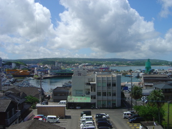 梅雨明けの市街地